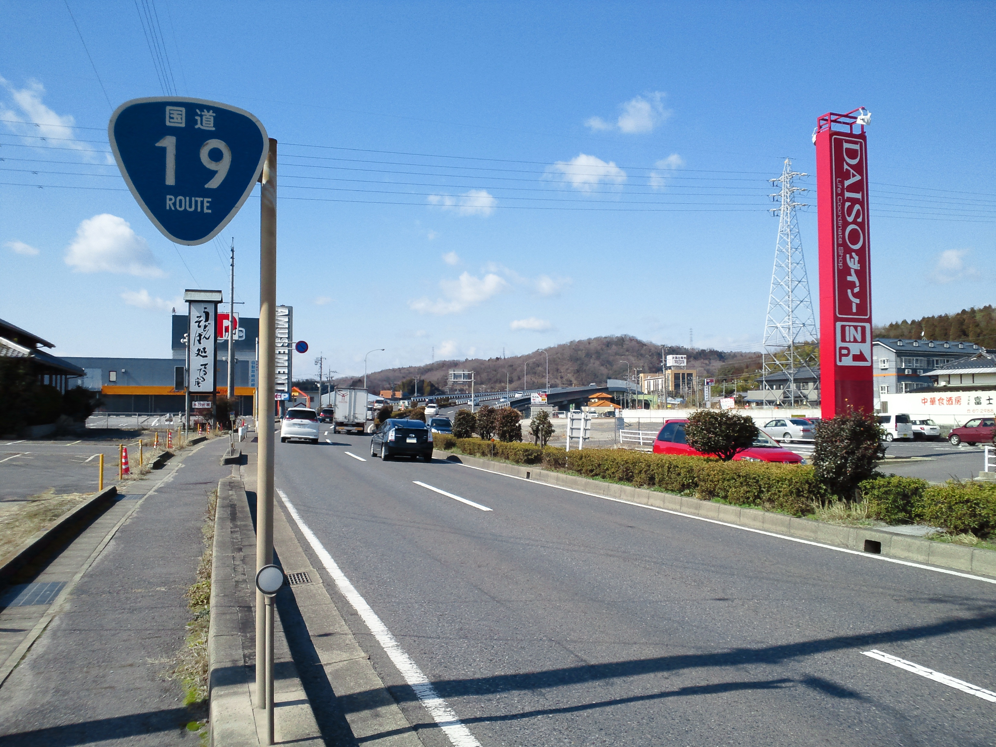 瑞浪市薬師町の国道19号瑞浪バイパス。